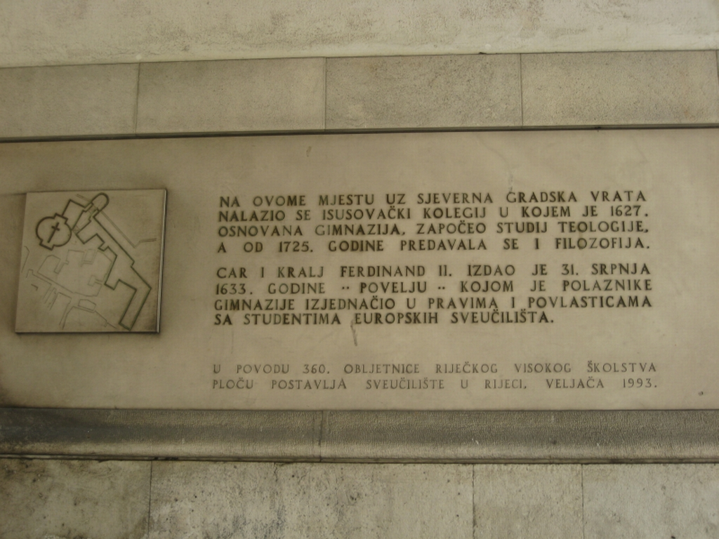 Spomen ploča na mjestu Isusovačkog kolegija u Rijeci. Croatia